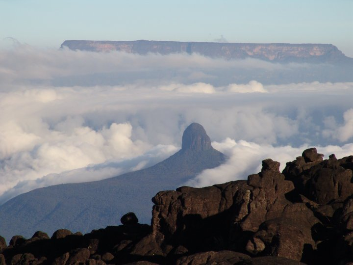 vista aerea de los tepueyes desde el matawy tepuy